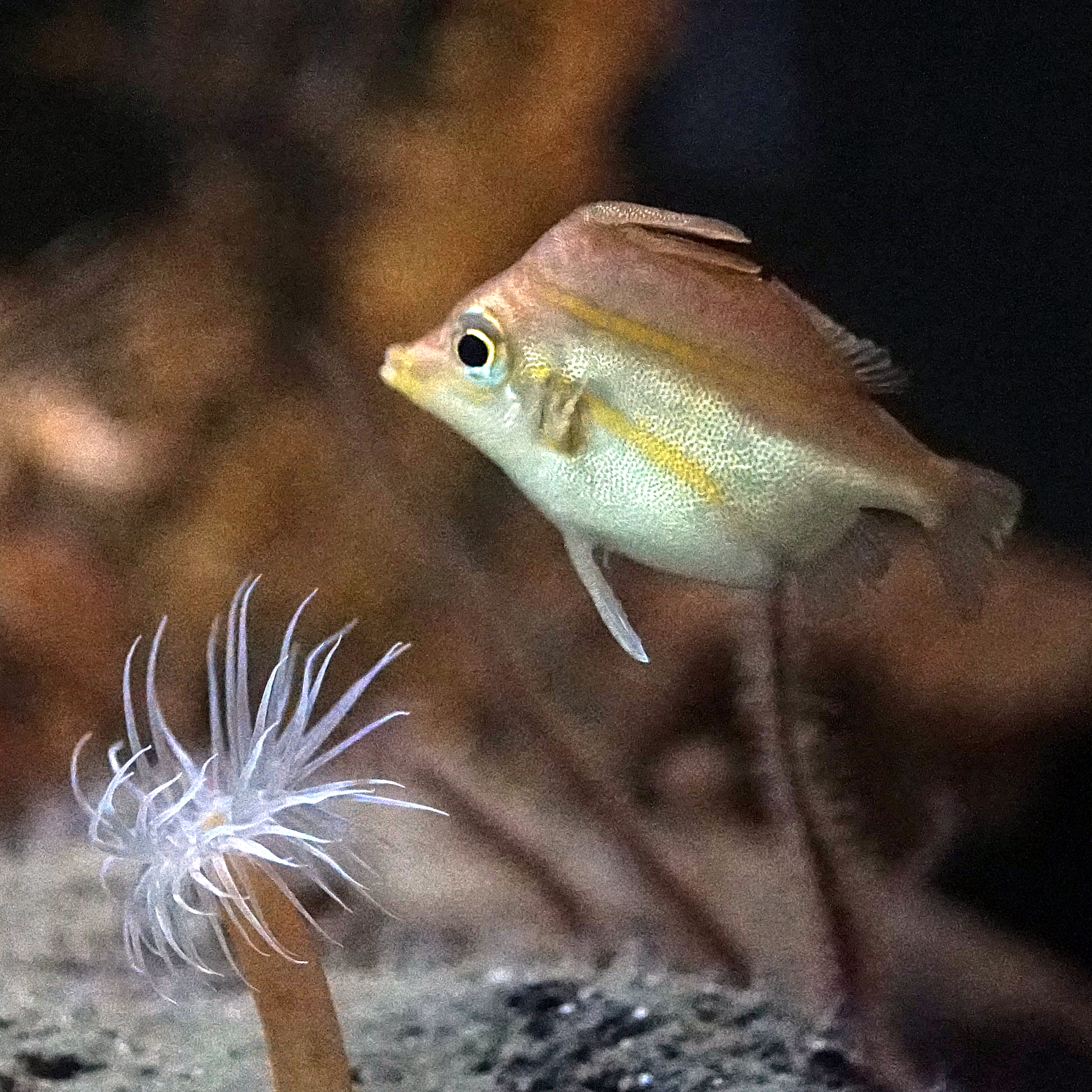 ベニカワムキ Red Spikefish Domain: Eukaryota • Regnum: Animalia • Phylum: Chordata • Subphylum: Vertebrata • Infraphylum: Gnathostomata • Superclassis: Osteichthyes • Classis: Actinopterygii • Ordo: Tetraodontiformes • Familia: Triacanthodidae • Genus: Triacanthodes Wikispecies has an entry on: Triacanthodes anomalus. Species Triacanthodes anomalus (Temminck and Schlegel, 1850) 動物界 脊索動物門 条鰭綱 フグ目 ベニカワムキ科 ベニカワムキ属 Location: Tokyo Sea Life Park (Kasai Rinkai Suizokuen), Japan Other photos: NCBI Taxonomy ID:245701 ITIS link: Triacanthodes anomalus (Temminck and Schlegel, 1850) (mirror) EOL link: Triacanthodes anomalus uBio search link: Triacanthodes anomalus